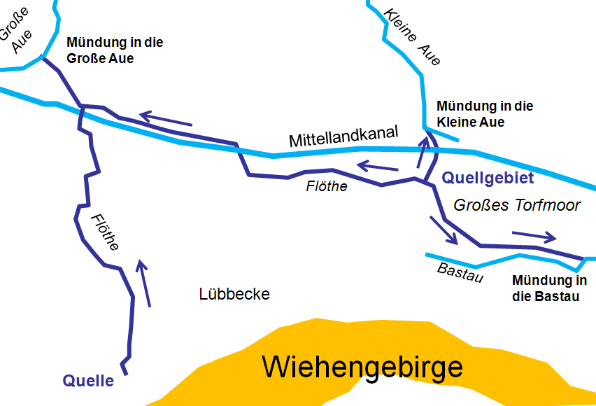 Übersichtskarte Flöthe